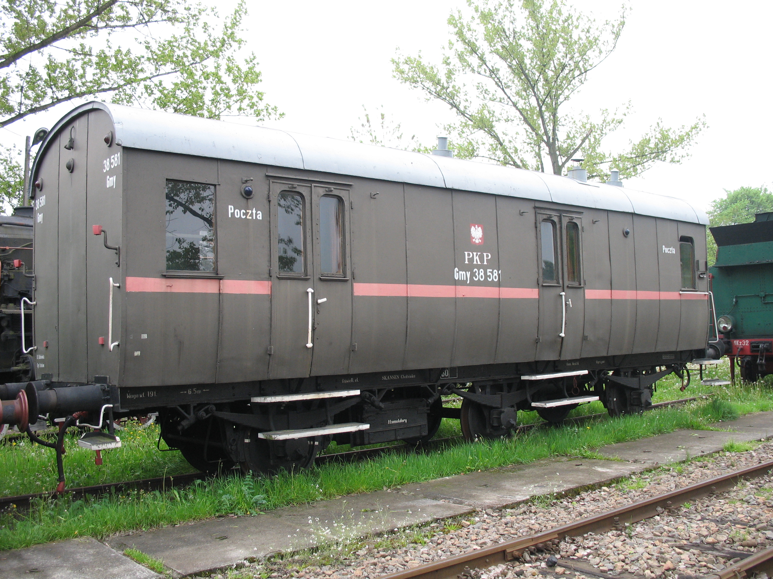 Wagon pocztowy Gmy numer 38 581. Zbudowany w 1909 roku. We wnętrzu wagonu zachowały się półki na listy, piec węglowy, i miejsce do obsługi interesantów. W zewnętrznych ścianach wagonu znajdują się otwory przeznaczone do wrzucania listów. Eksponat skansenu taboru kolejowego w Chabówce